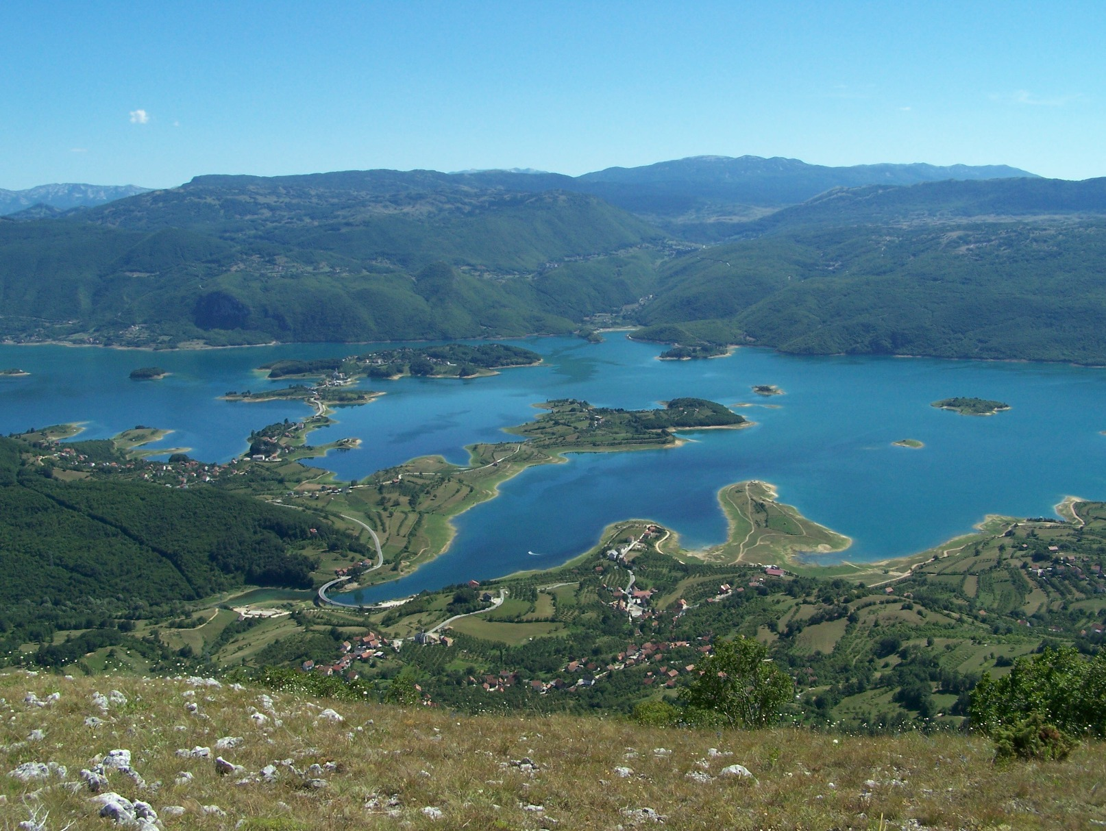 Ramsko Lake -Prozor-Rama